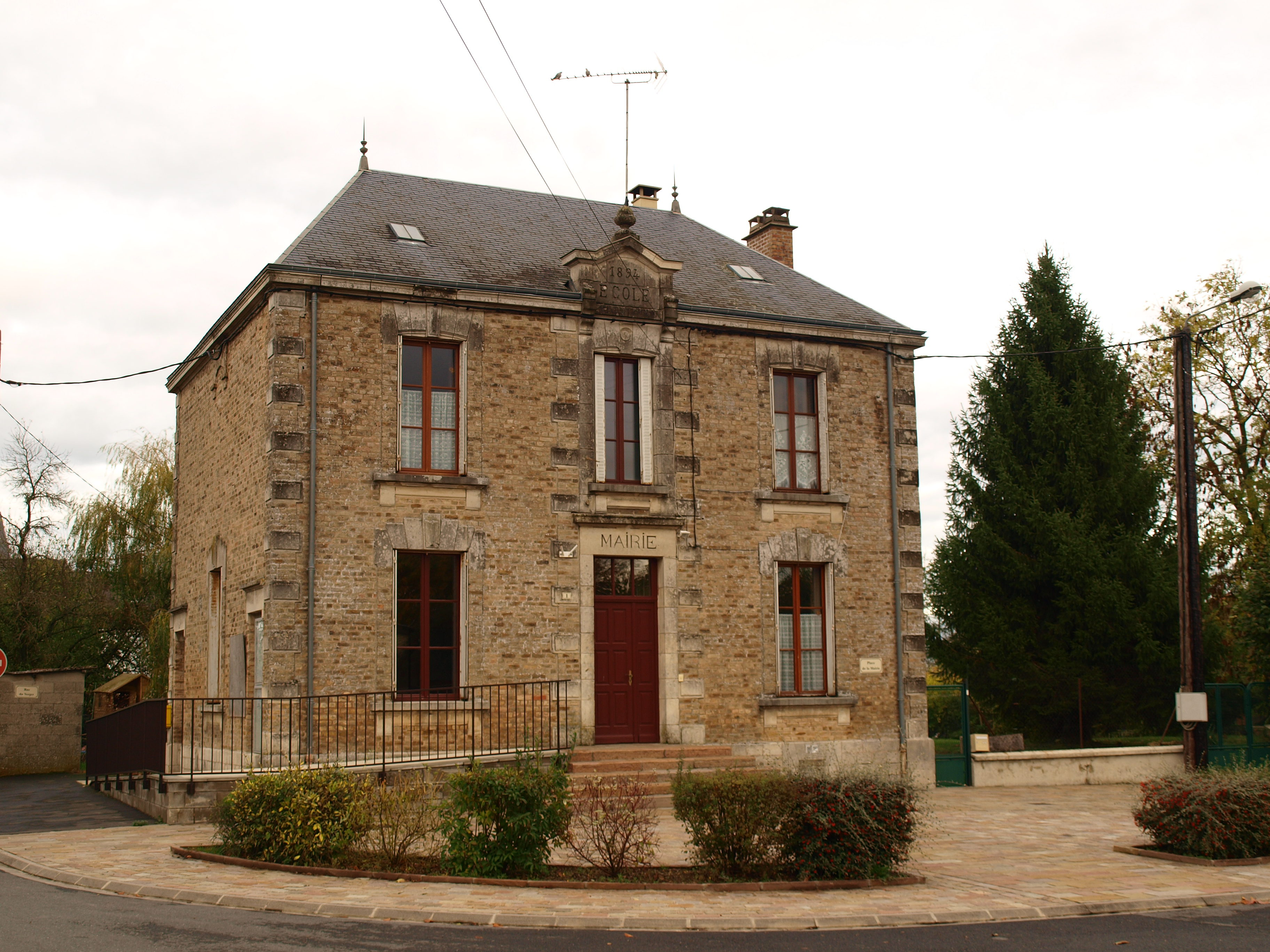 Mars-sous-Bourcq (Ardennes, France) ; mairie